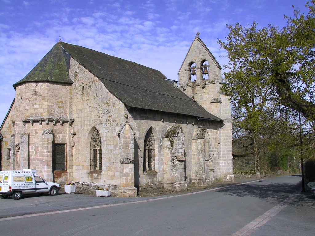 Église Saint-Georges de Tarnac, (Classé, 1919)